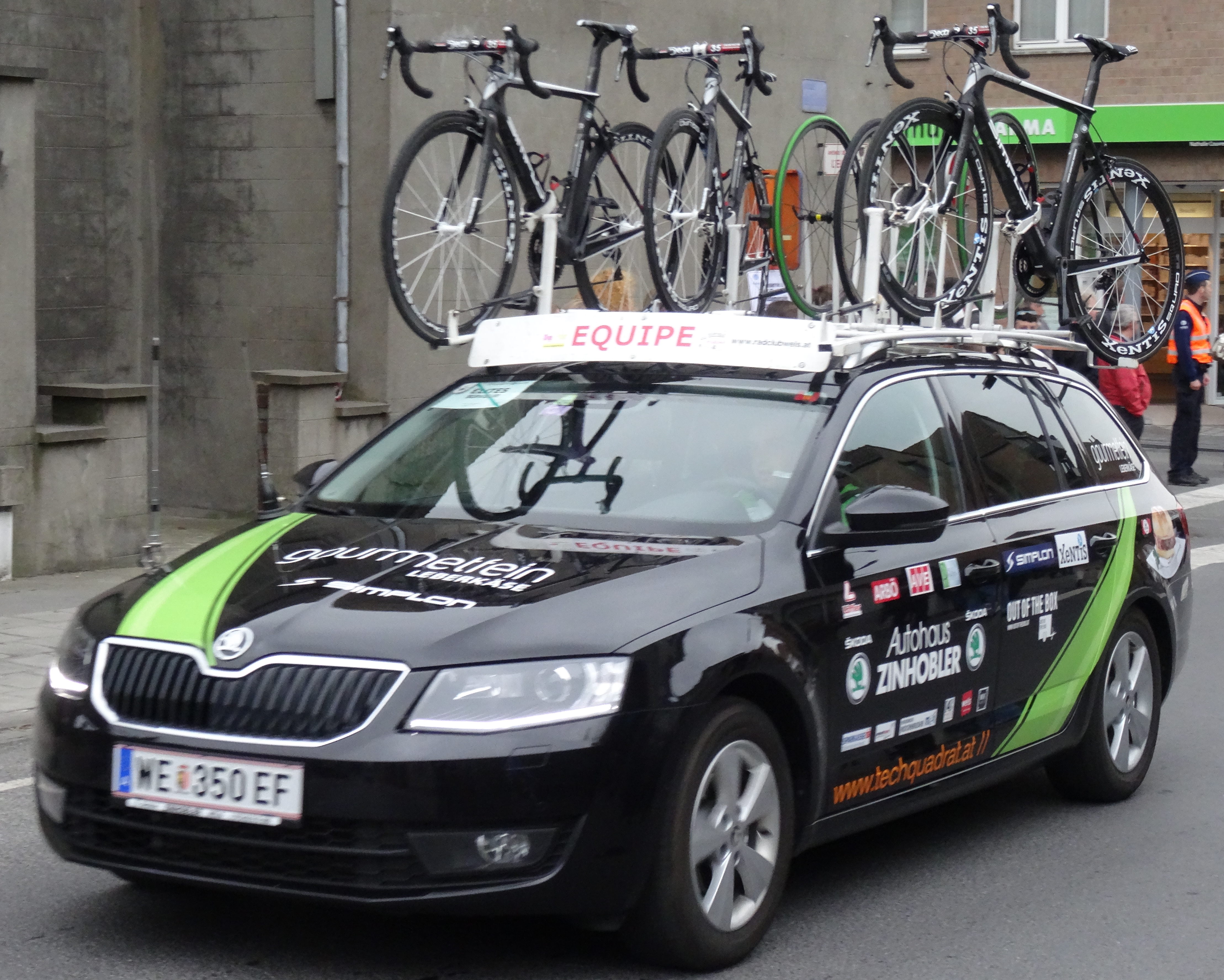 Triptyque des Monts et Châteaux 2014, étape 1, 4 avril 2014, départ d'Antoing. Depicted team: Gourmetfein Simplon Wels The creation of these files was made possible thanks to the organizers of the Triptyque des Monts et Châteaux 2014 English | français | +/−